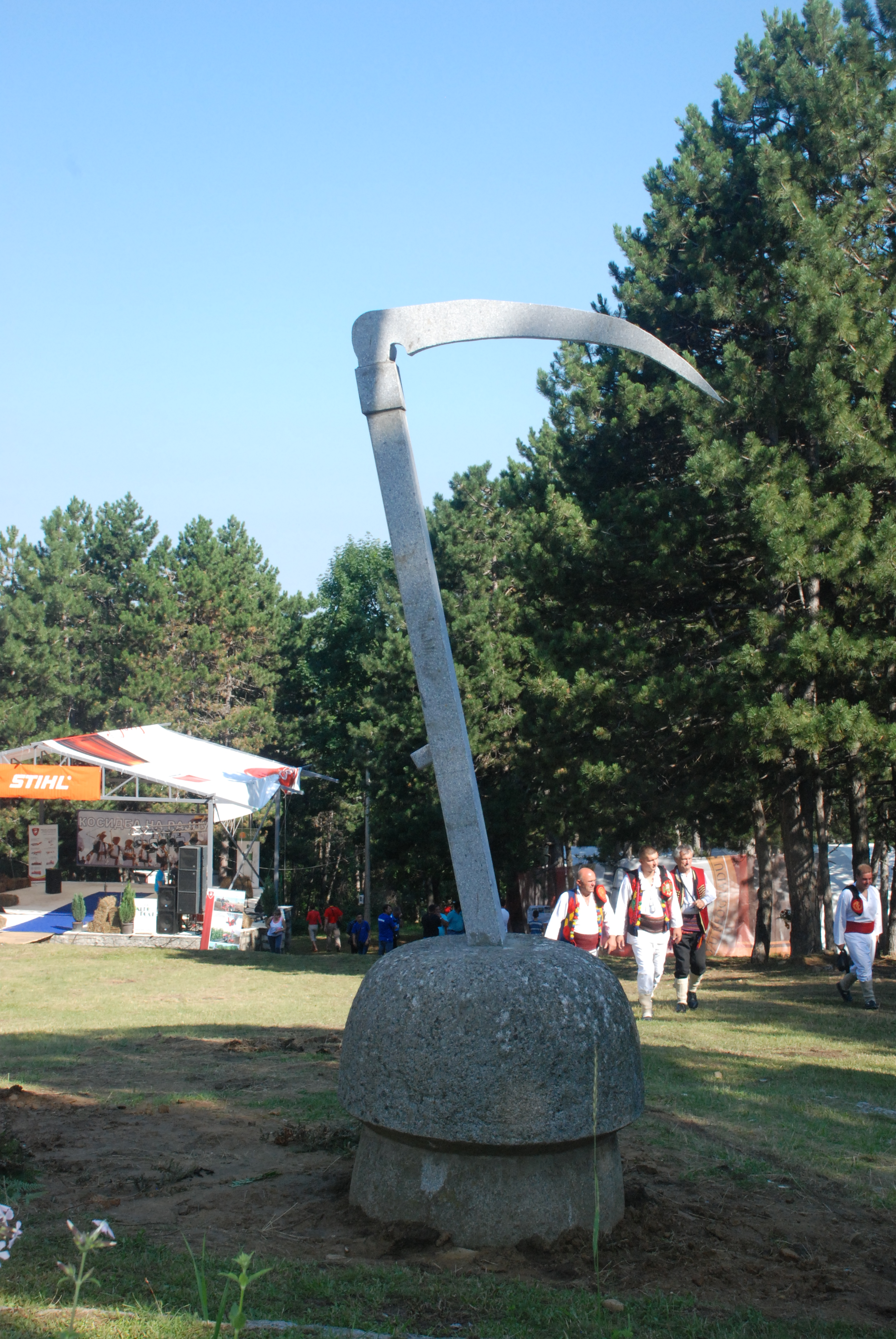 Српски (ћирилица): Ово је фотографија заштићеног природног добра у Србији под шифром: ПИО10 This is a a photo of a natural area in Serbia with ID: ПИО10